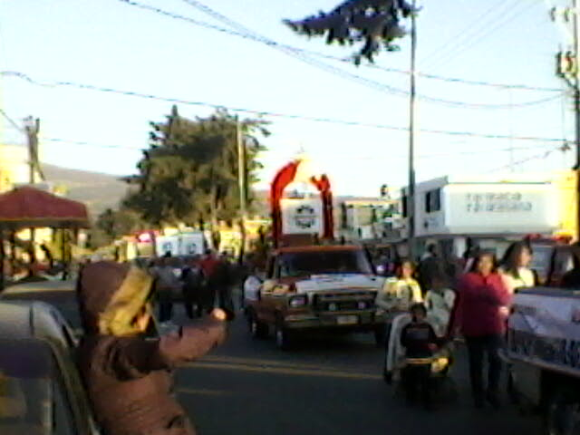 En ella se muestra cómo se forman las peregrinaciones anuales en la víspera del 12 de diciembre.